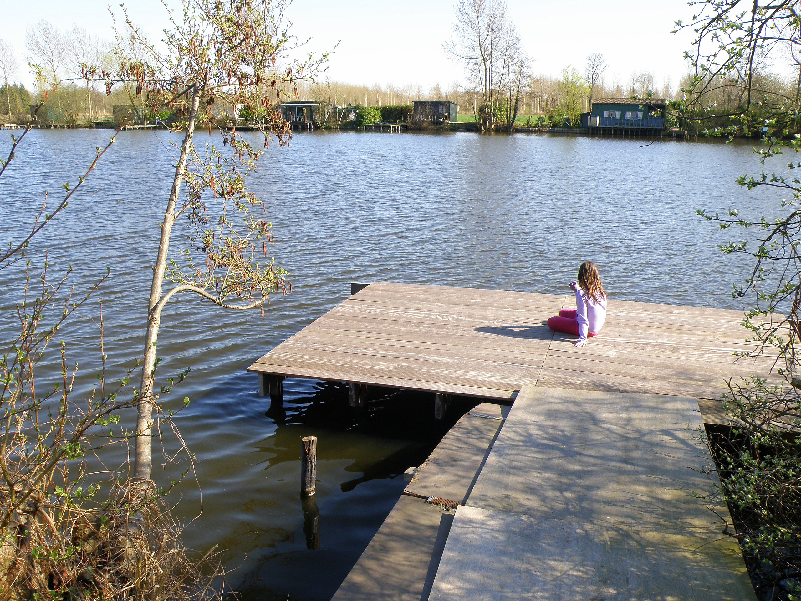 Weert, Antwerp Weert, gem. Bornem. Oude Schelde.